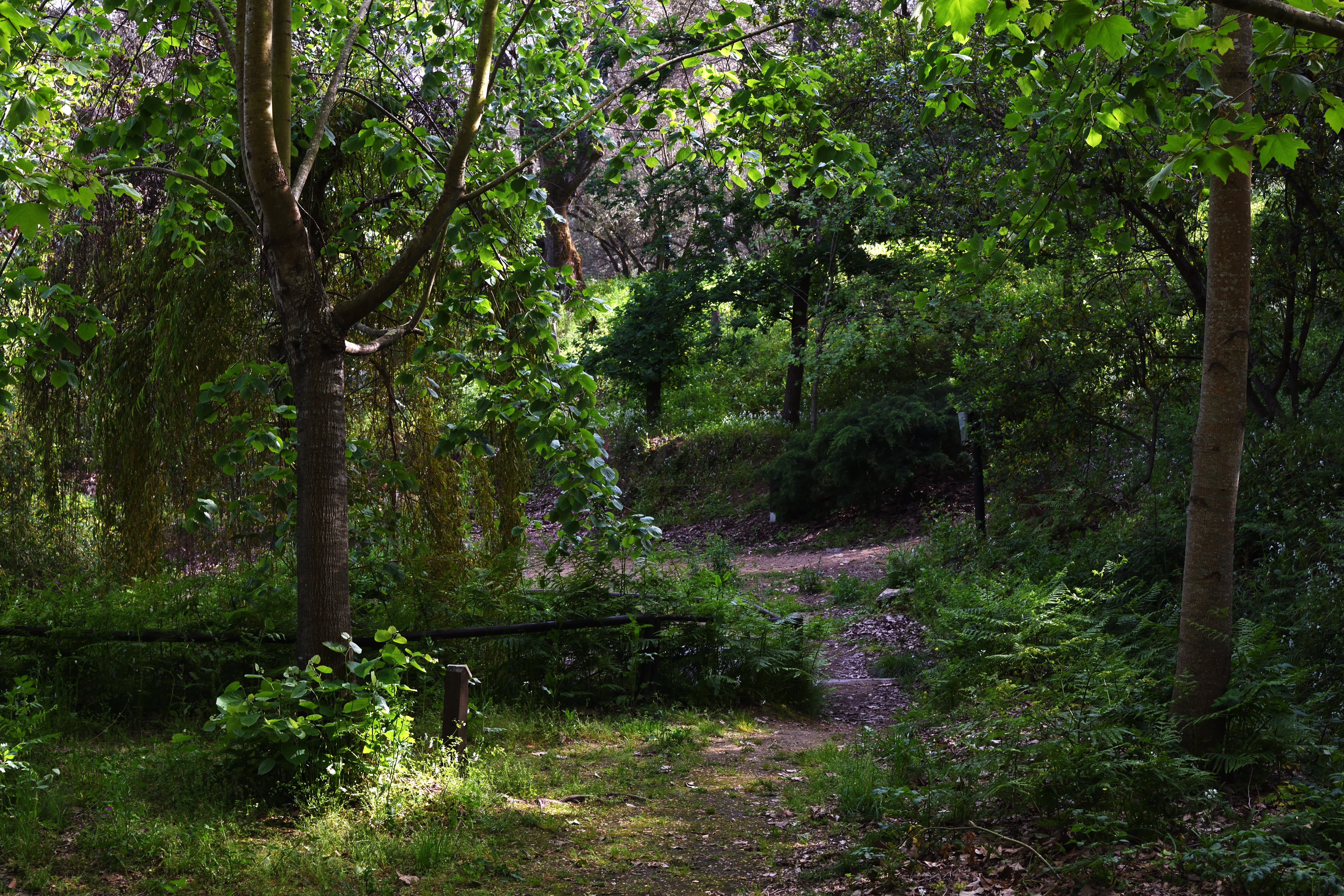 Ajaccio, arboretum dans la domaine des Milelli